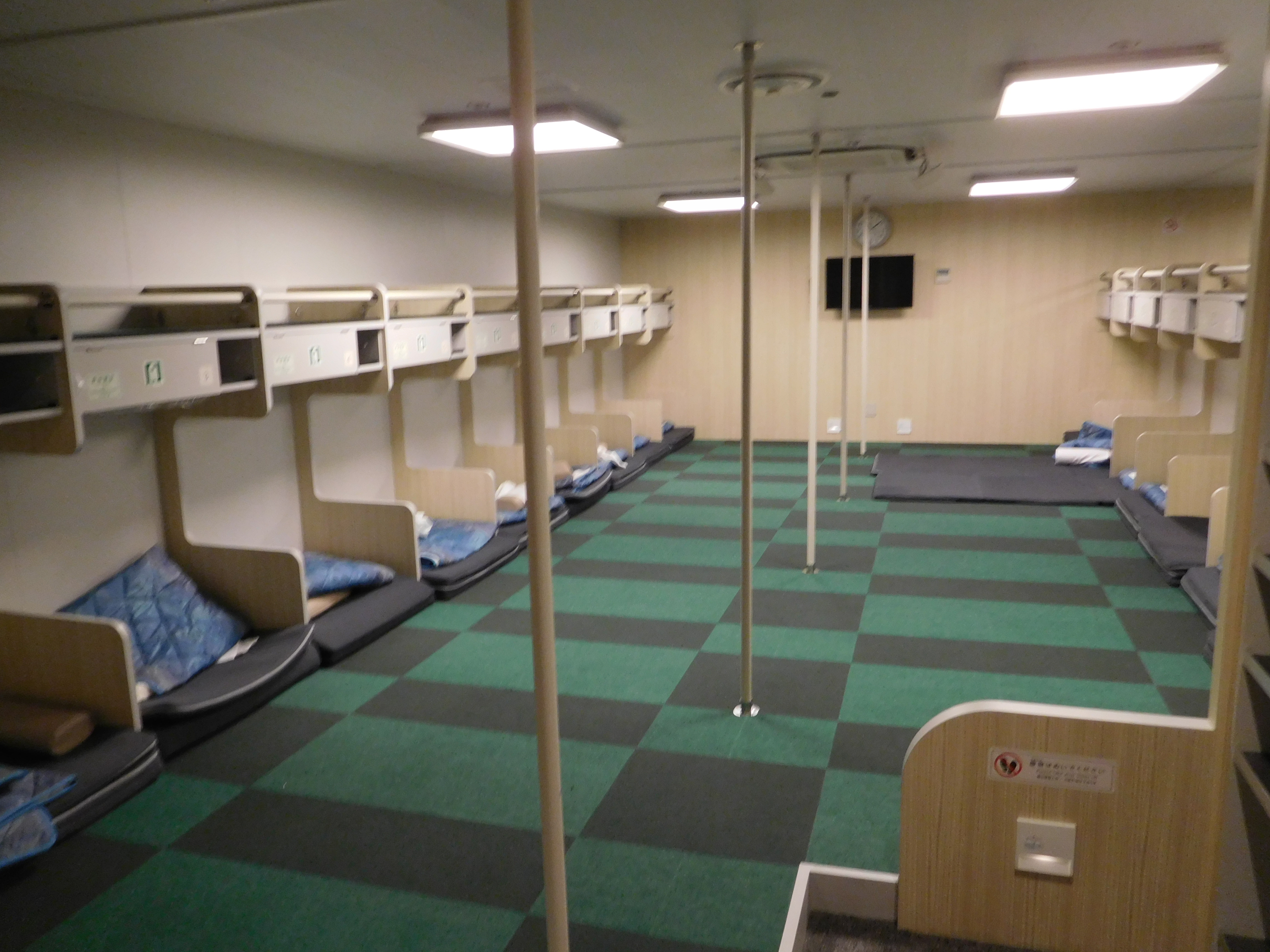 貨客船３代目おがさわら丸の二等和室 20160915に撮影